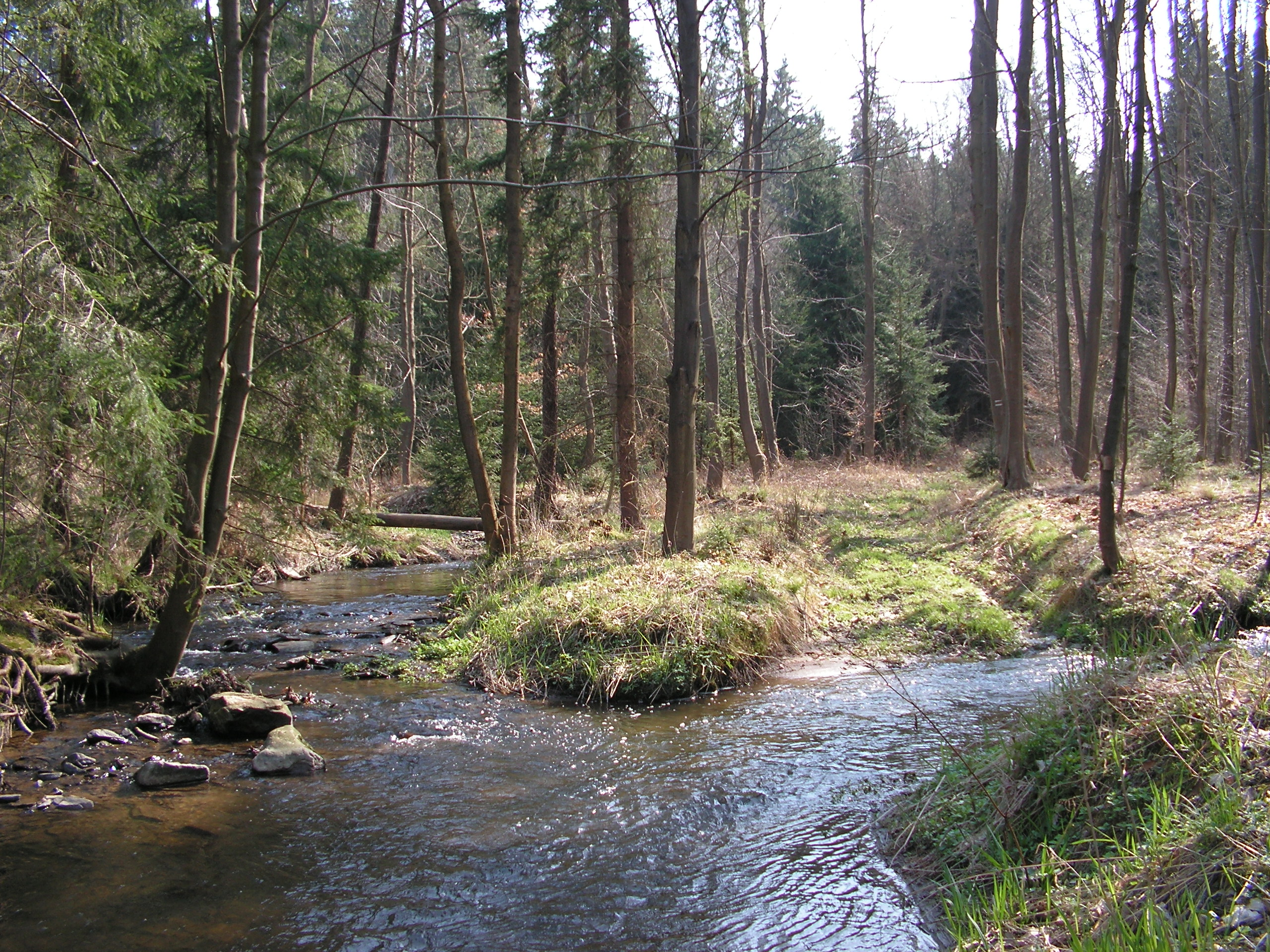 Soutok Jánského a Senetínského potoka.